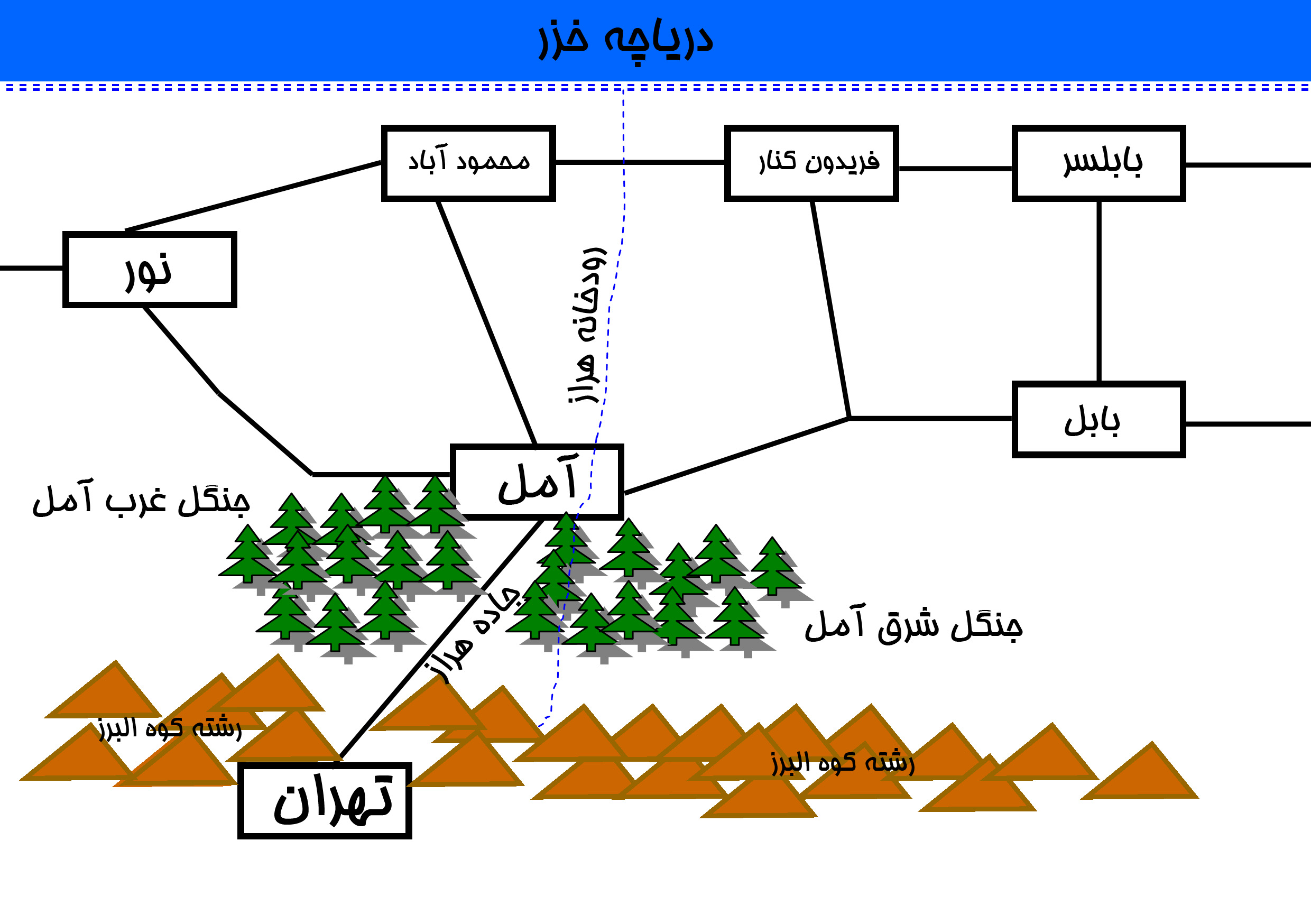 موقعیت استراتژیک آمل که یکی از دروازه‌های ورودی استان مازندران به شمار میرود